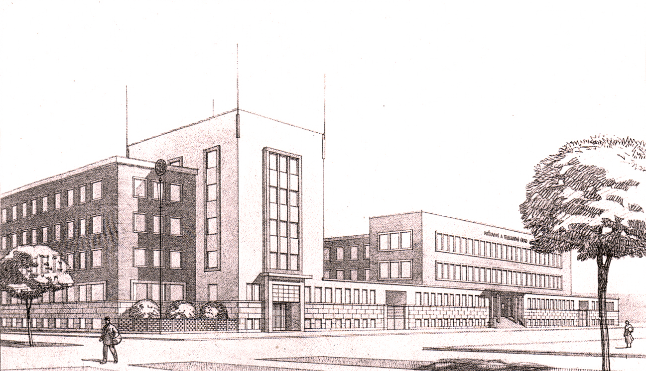 dobový pohľad na poštu